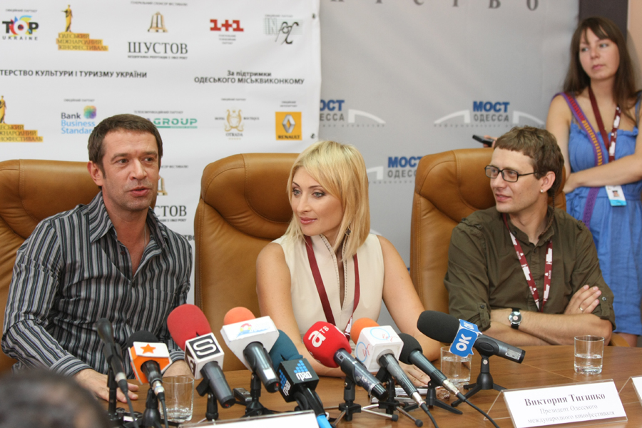 Владимир Машков, советский и российский актёр. Пресс-конференция Владимира Машкова и Алексея Учителя, Одесский международный кинофестиваль 2010. Depicted people: Владимир Машков, Виктория Тигипко and Денис Иванов